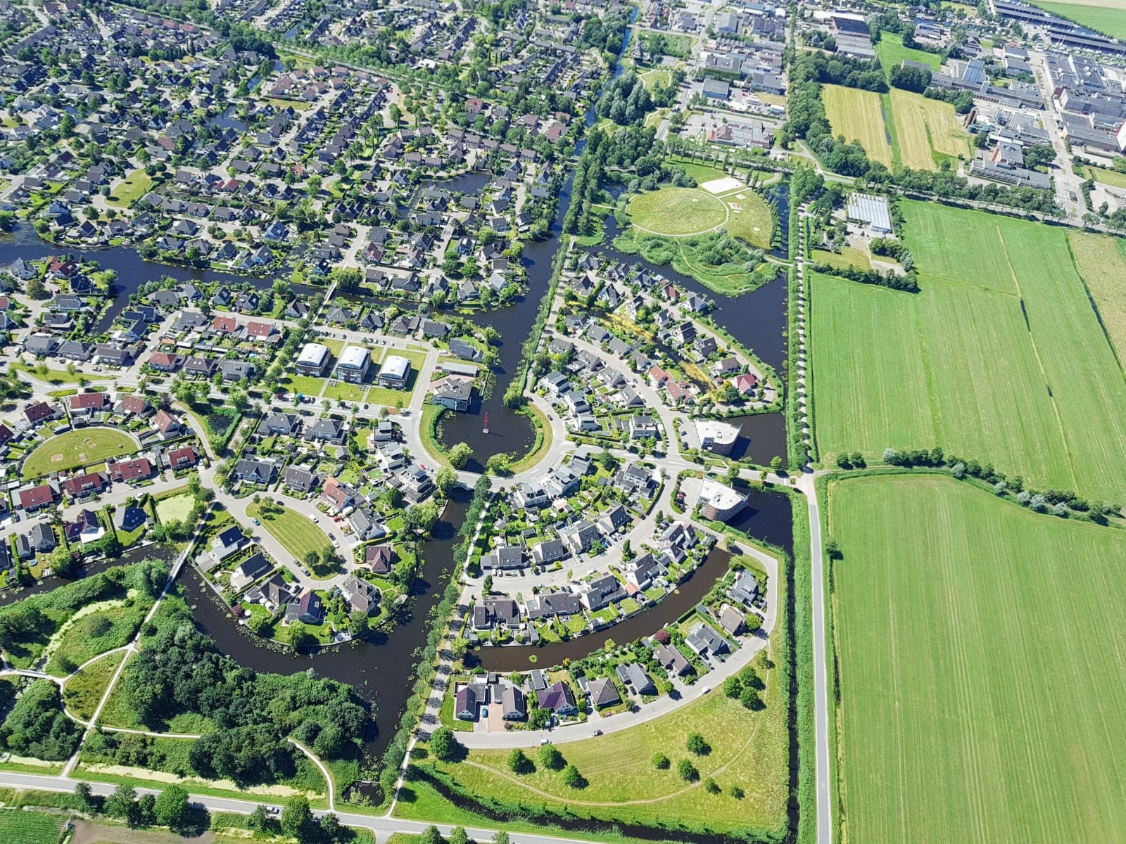 Noardlik diel fan de wyk Skipsleat op De Jouwer yn Fryslân út de helikopter sjoen. Rjochts de Vegelinswei, ûnder de Koarte Ekers.